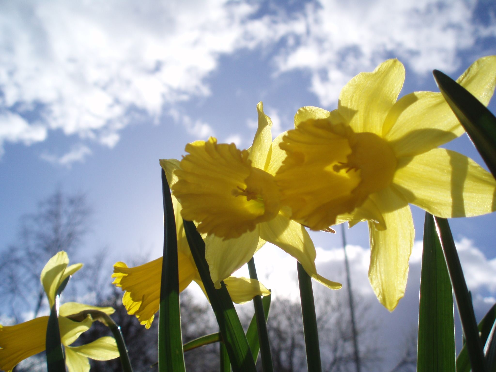 Narcissen.